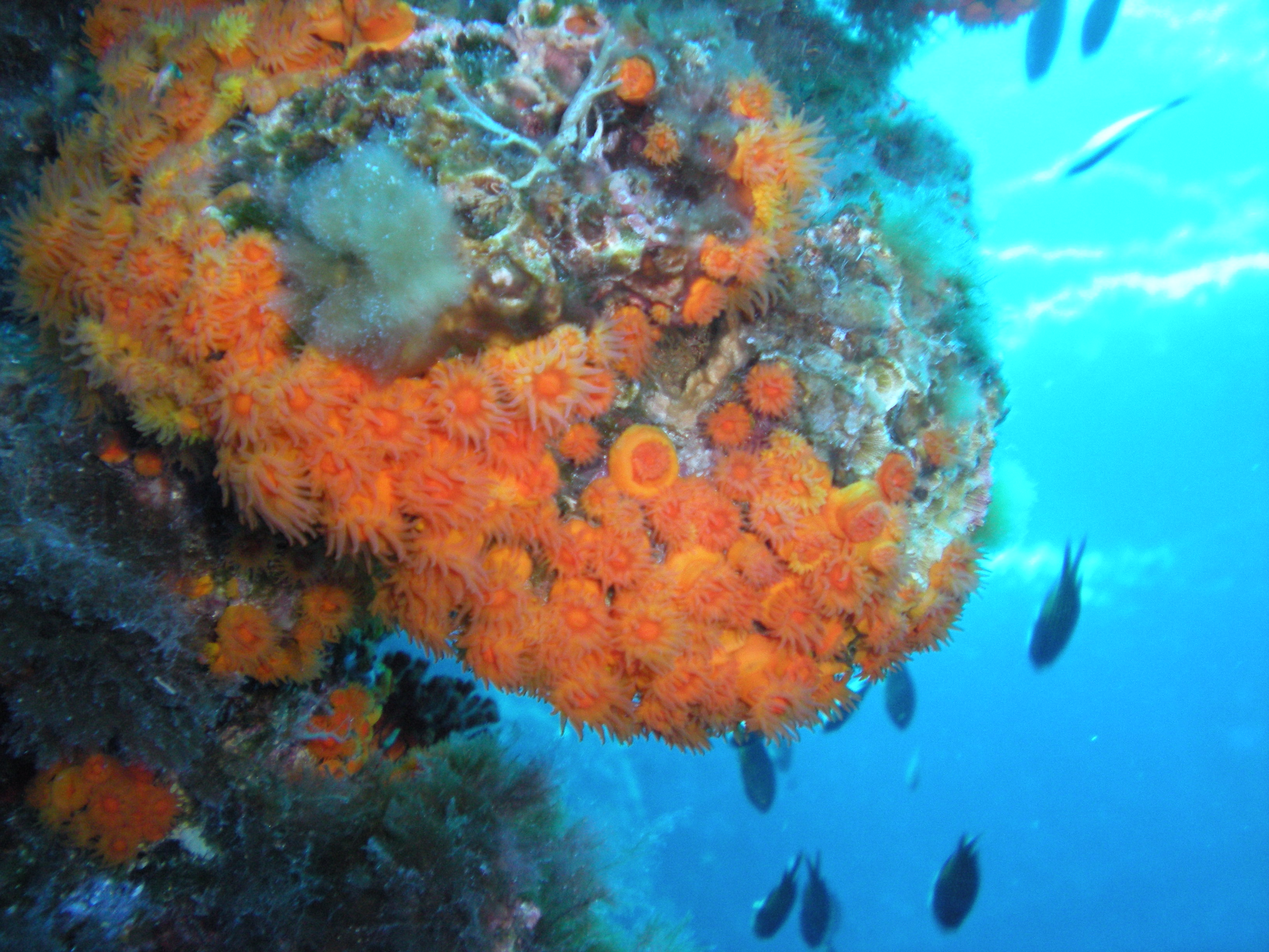 Astroides calycularisLinosa, Mediterranean Sea